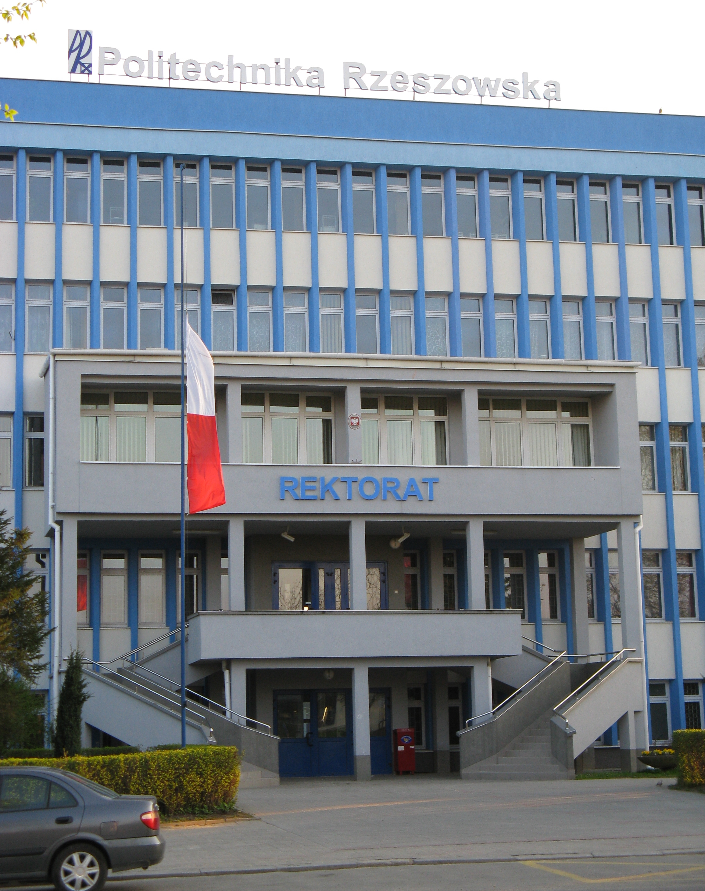 Dawny Budynek Rektoratu Politechniki Rzeszowskiej(ob. Wydział Elektrotechniki i Informatyki), ul. W. Pola 2